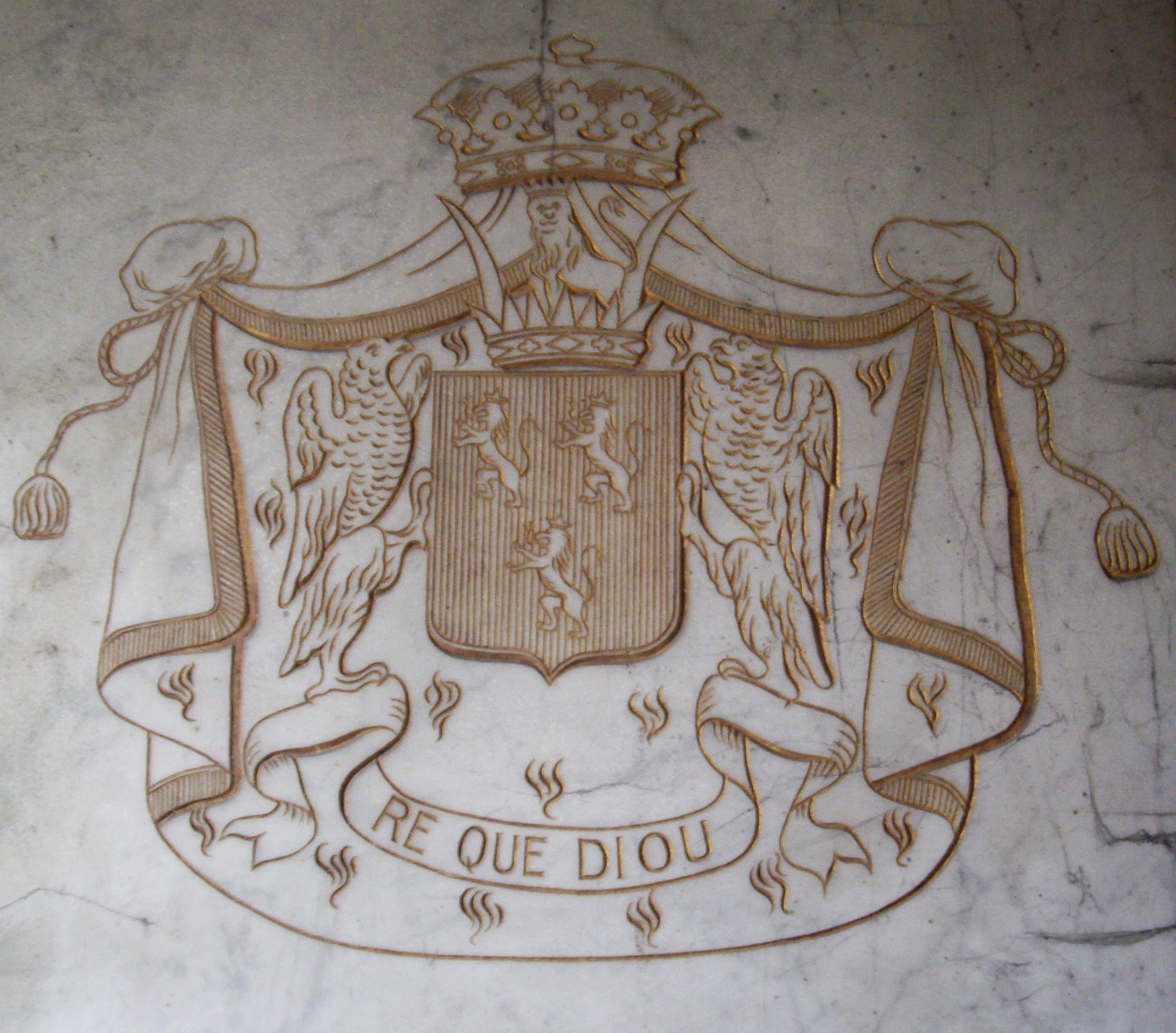 Armoiries des Talleyrand-Périgord dans la chapelle des ducs de Montmorency, cimetière d'Auteuil, division 4.